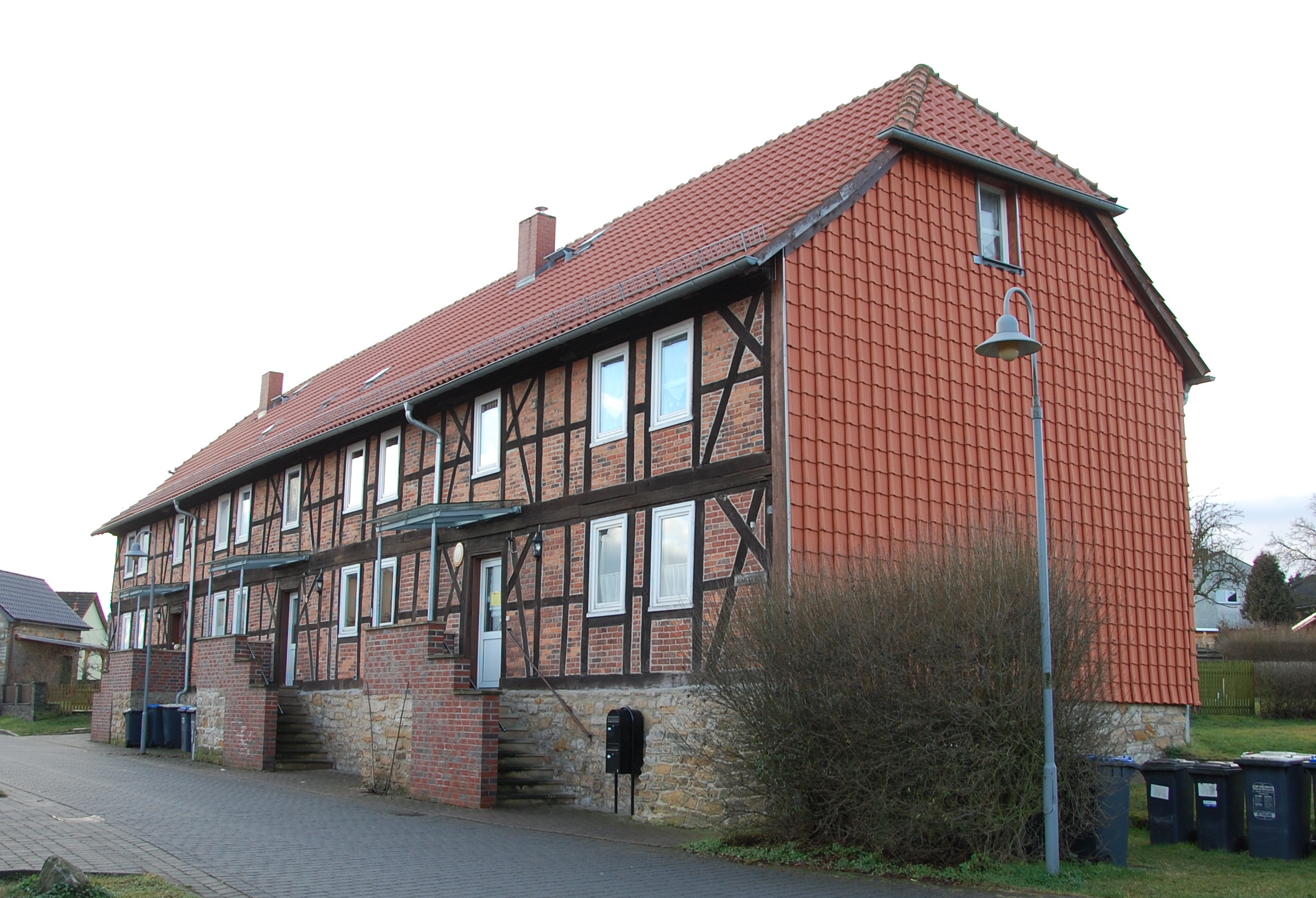 Haus Ackerstraße 10 in Morsleben